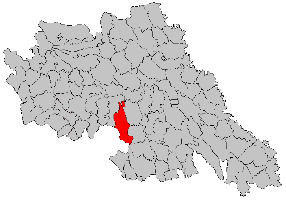 Categorie:Hărţi ale judeţului Iaşi